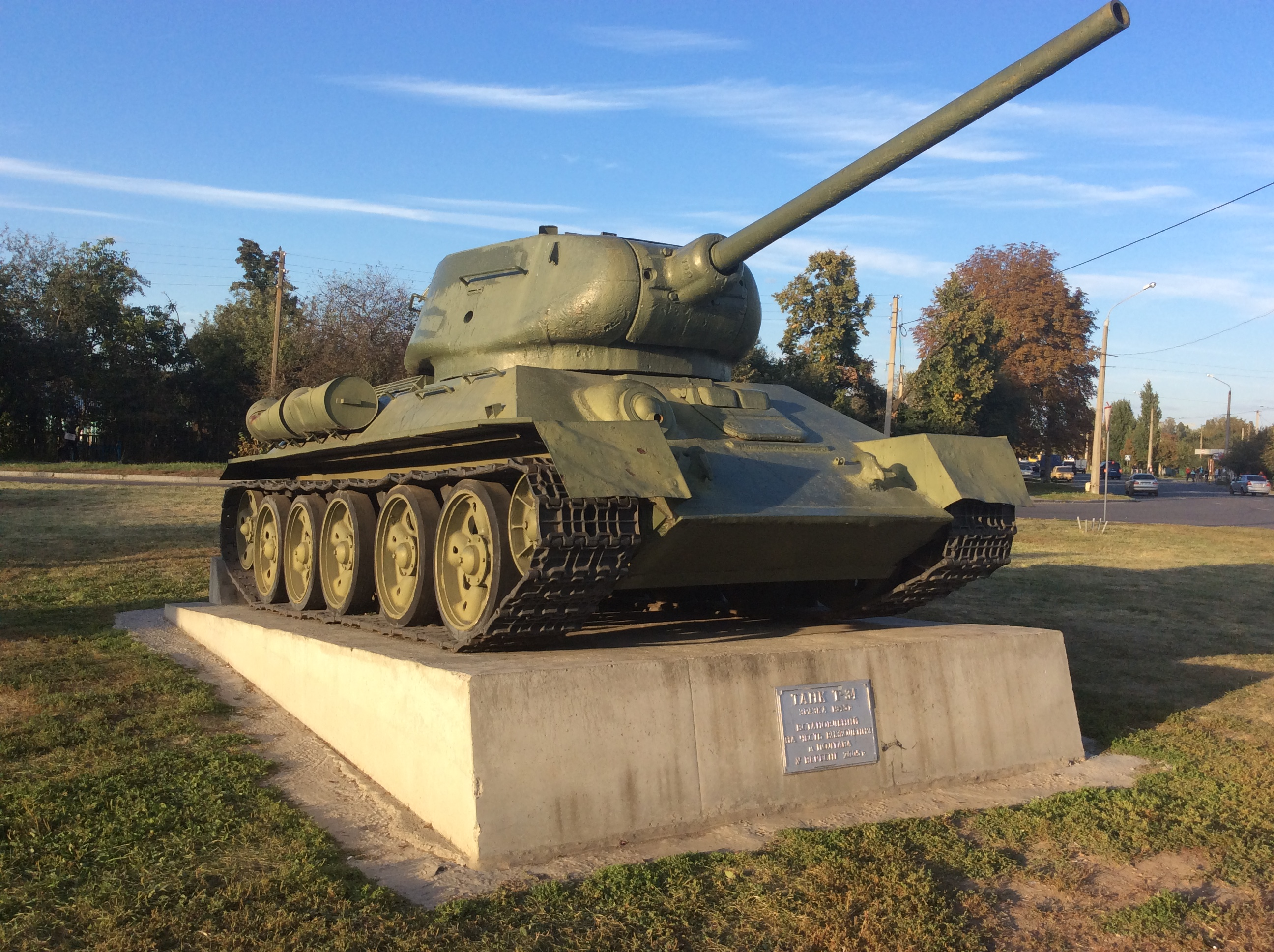 Пам'ятник — Танк Т‑34, Полтава, вул. Ковпака, біля Супрунівського шляхопроводу. Придбаний, відреставрований і встановлений за особисті кошти Віктора Зубрицького у 2004 році.